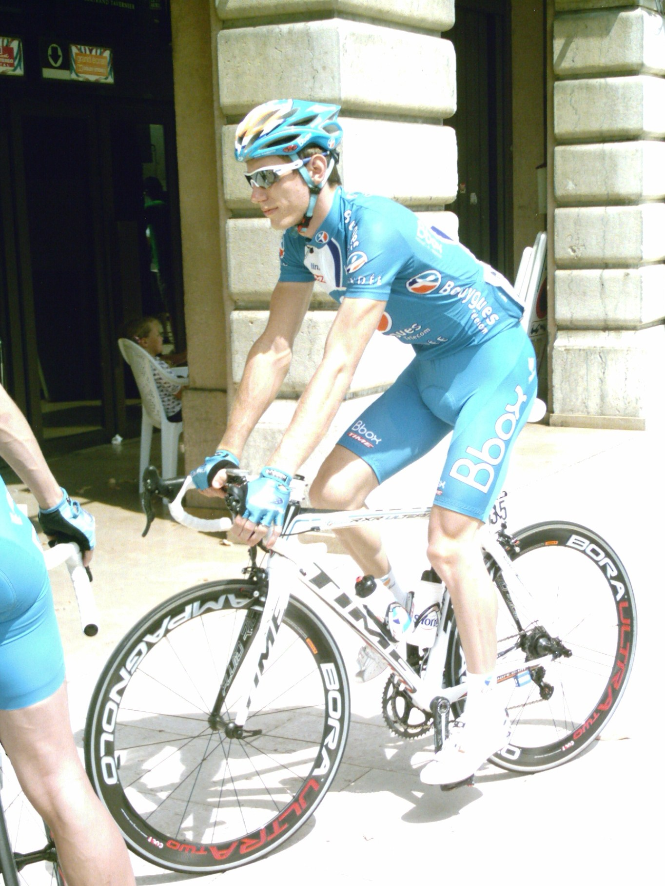 Pierre Rolland lors de la signature préalable au départ de la première étape du Tour de l'Ain 2009